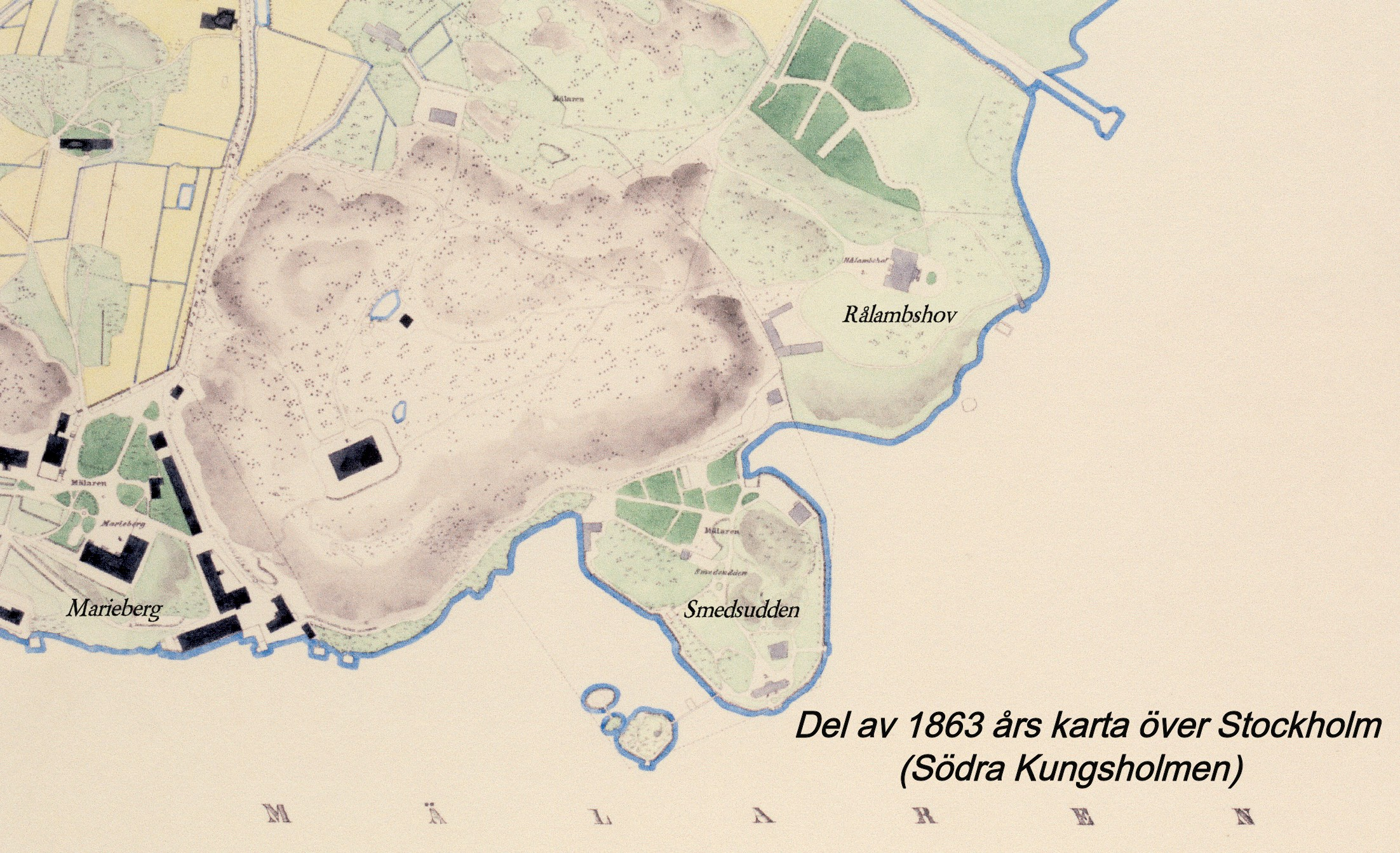 Del av 1863 års karta över Stockholm, södra Kungsholmen med Smedudden och Rålambshov